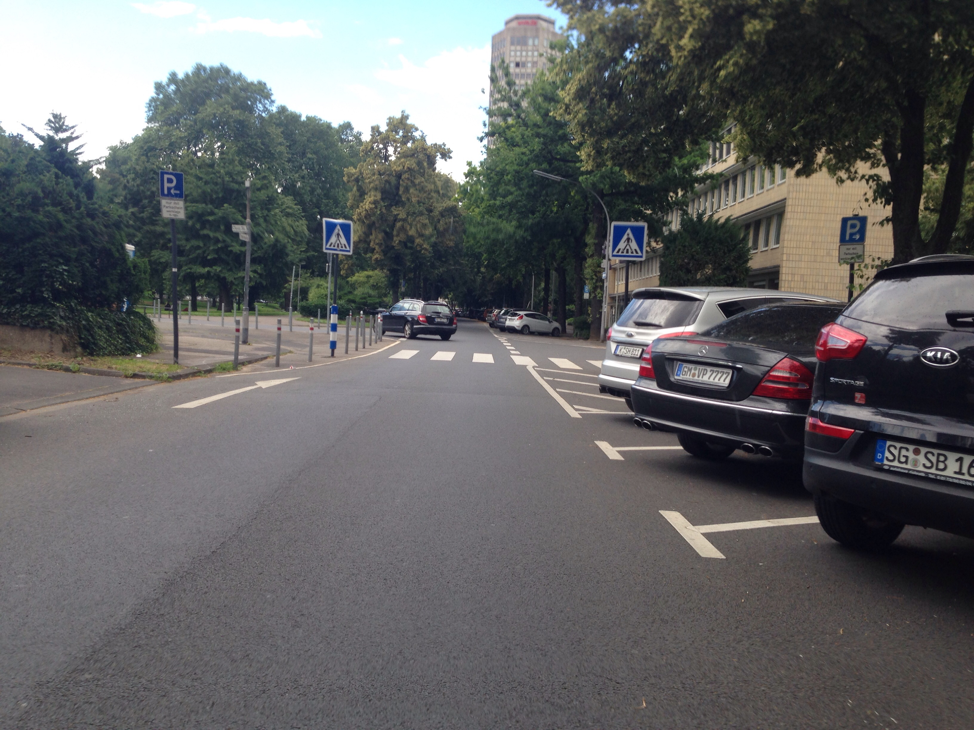 Der Kölner Theodor-Heuss-Ring in südlicher Richtung vor der Einrichtung des Radfahrstreifens.